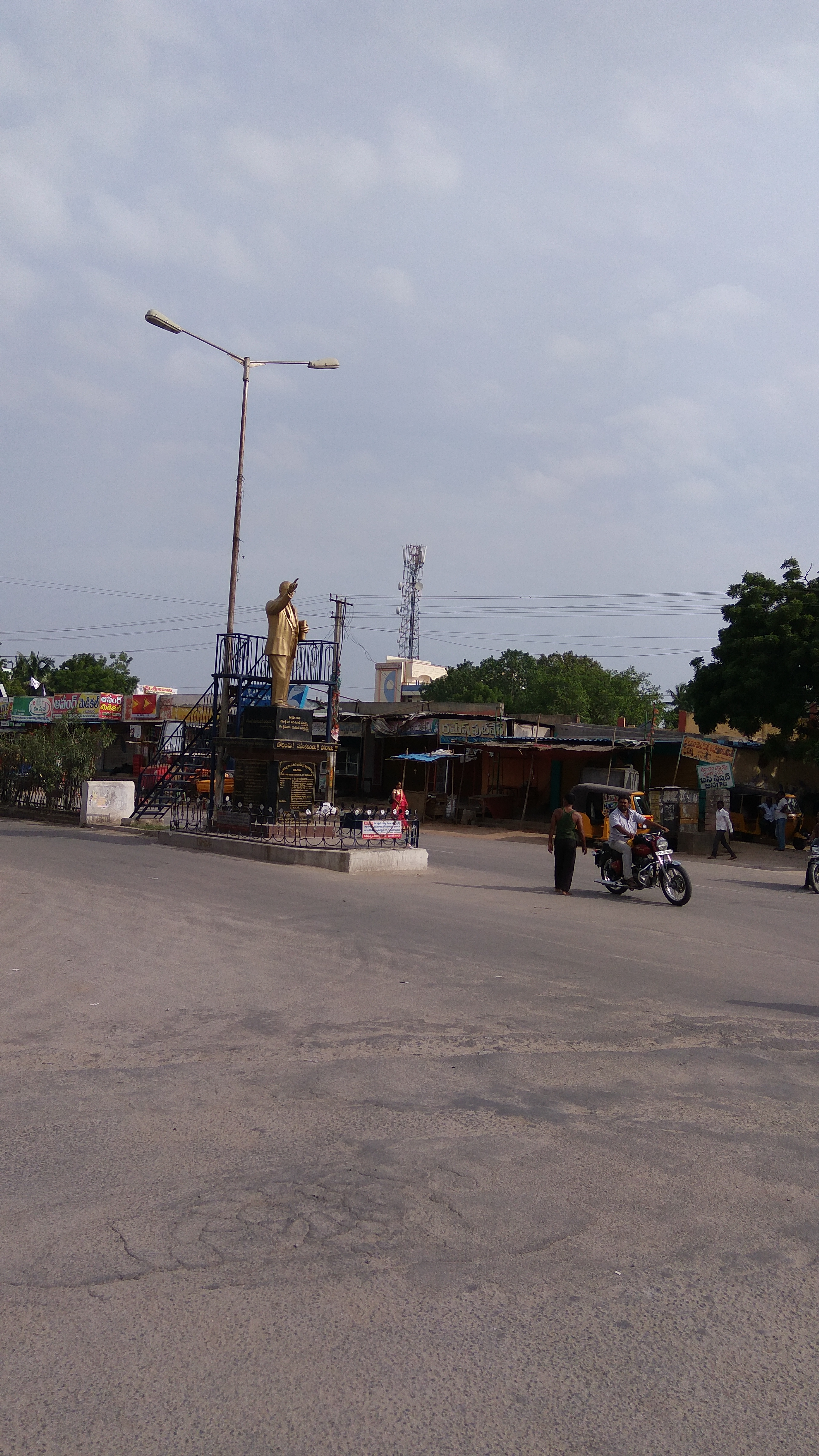 జనగాంలోని అంబేద్కర్ కూడలి